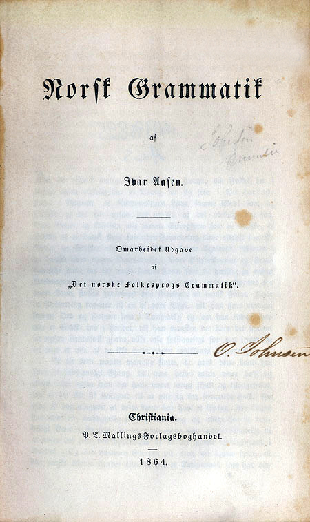 Tittelside til Norsk Grammatik